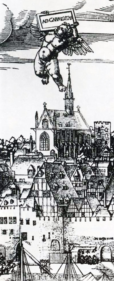 Nach Anton Woensam, 1531: Ansicht die Karmeliterkirche in Köln